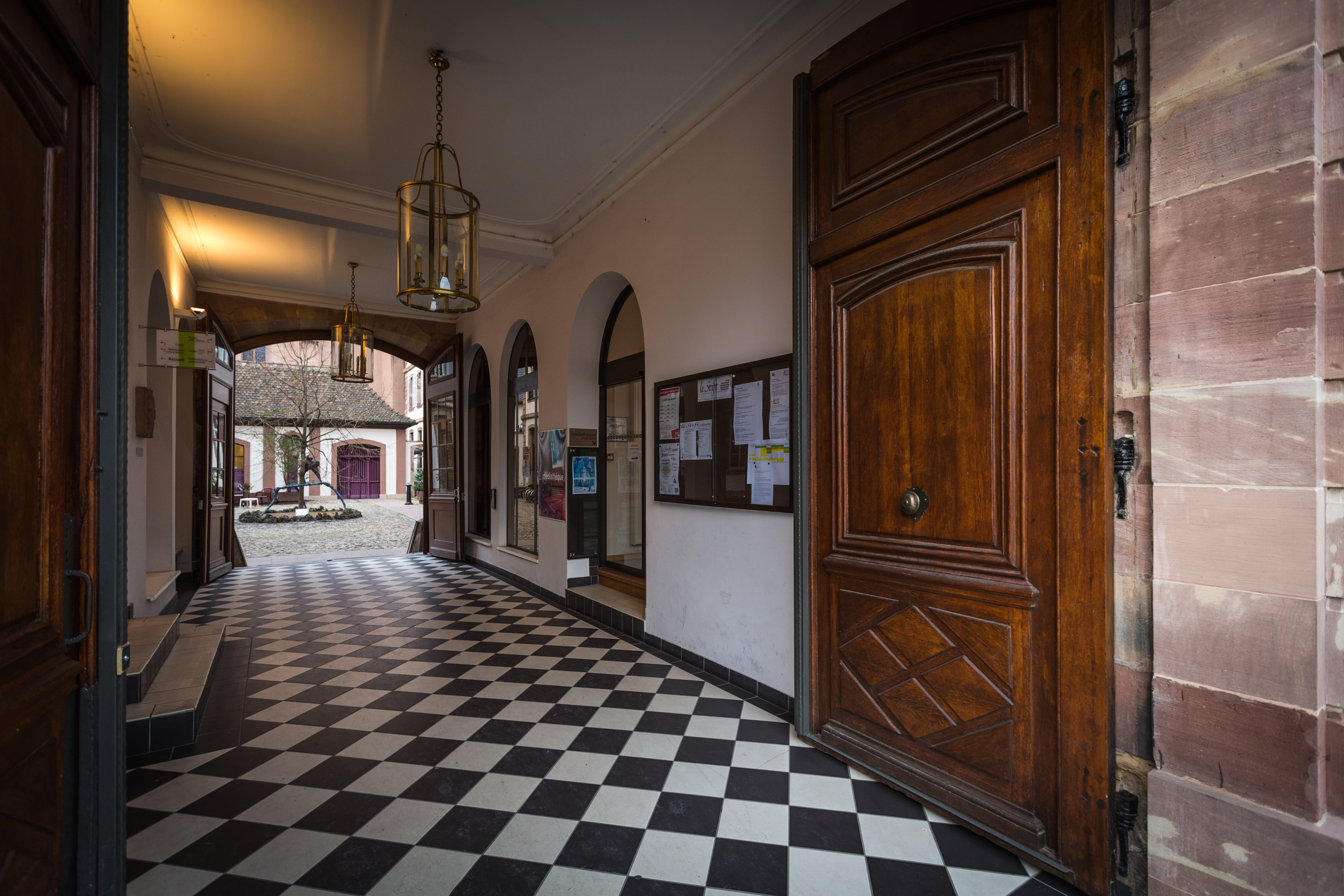 Strasbourg 1b quai Saint-Thomas entrée Stift et Médiathèque protestante